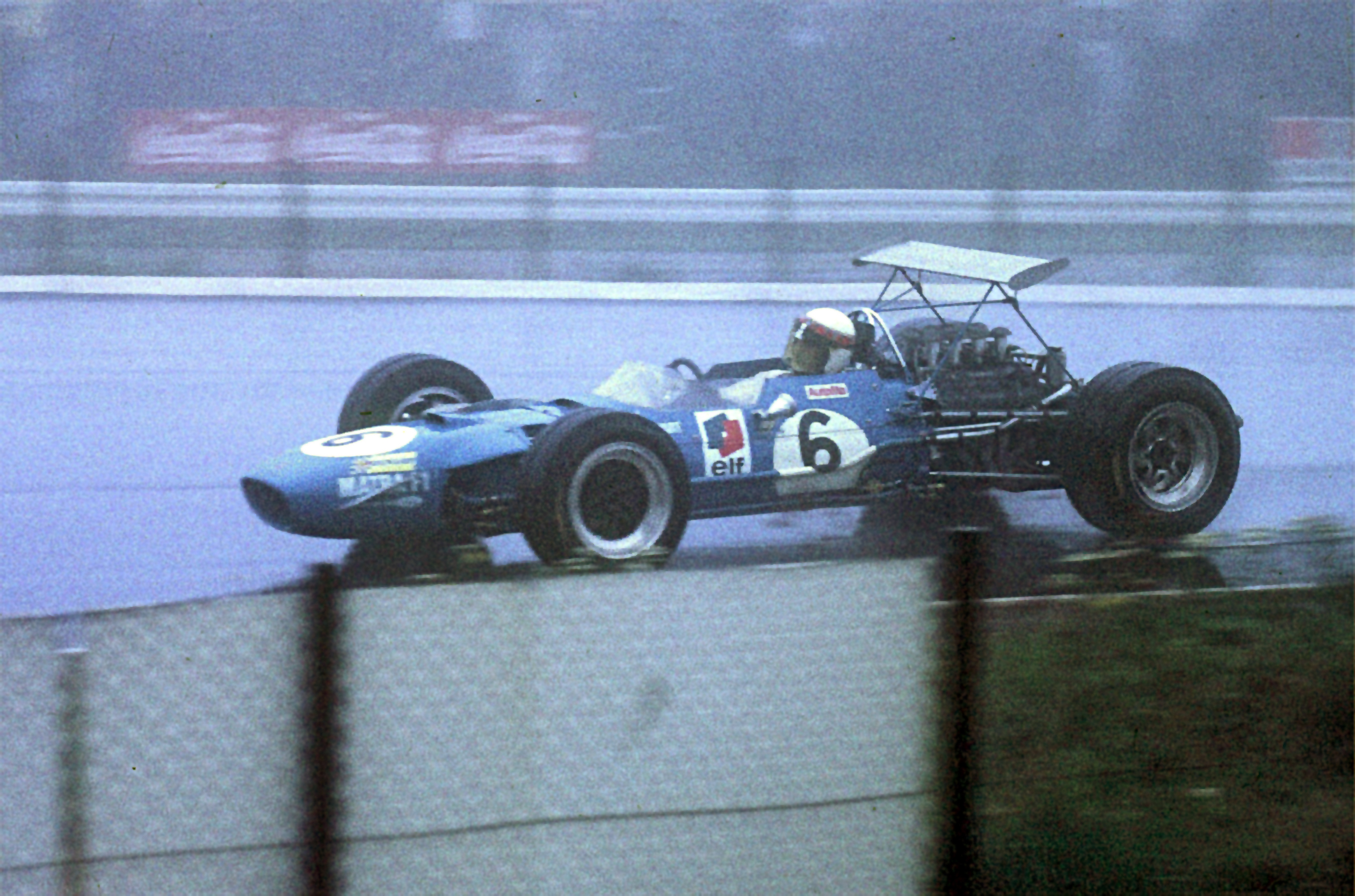 Jackie Stewart im Matra MS10, 2. Runde GP Deutschland, Nürburgring, Eingangs-Südkehre